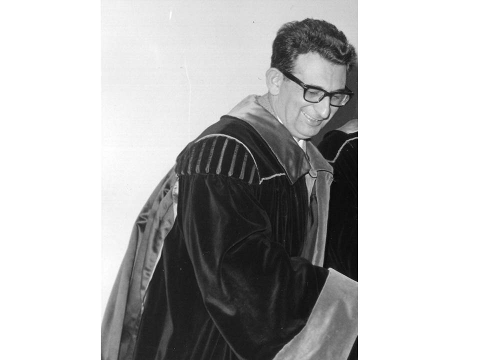 Il Professor P.A. Jannini durante le tesi di laurea negli anni '70